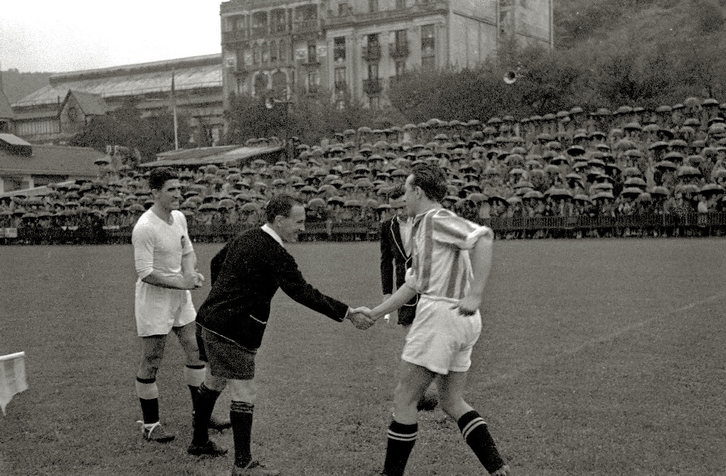 Título original: Partido de fútbol entre la Real Sociedad y el Valencia en el campo de Atotxa (4/4) Localización: San Sebastián (Guipúzcoa)